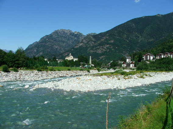 Panorama della città di Scopello (VC)